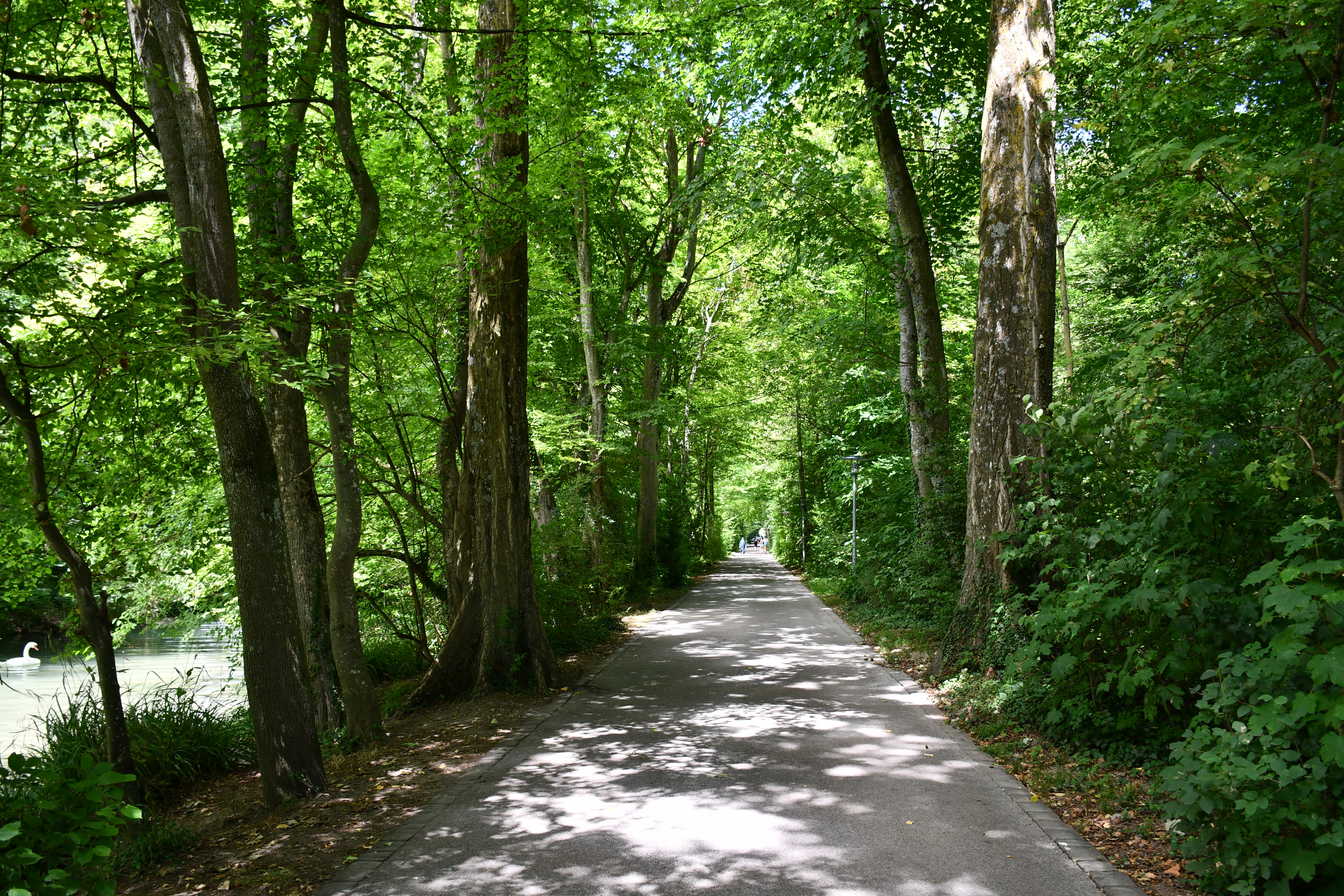 La promenade de Vidy, le long de la Chamberonne, dans la réserve naturelle et ornithologique du parc Louis-Bourget (Lausanne, Suisse).